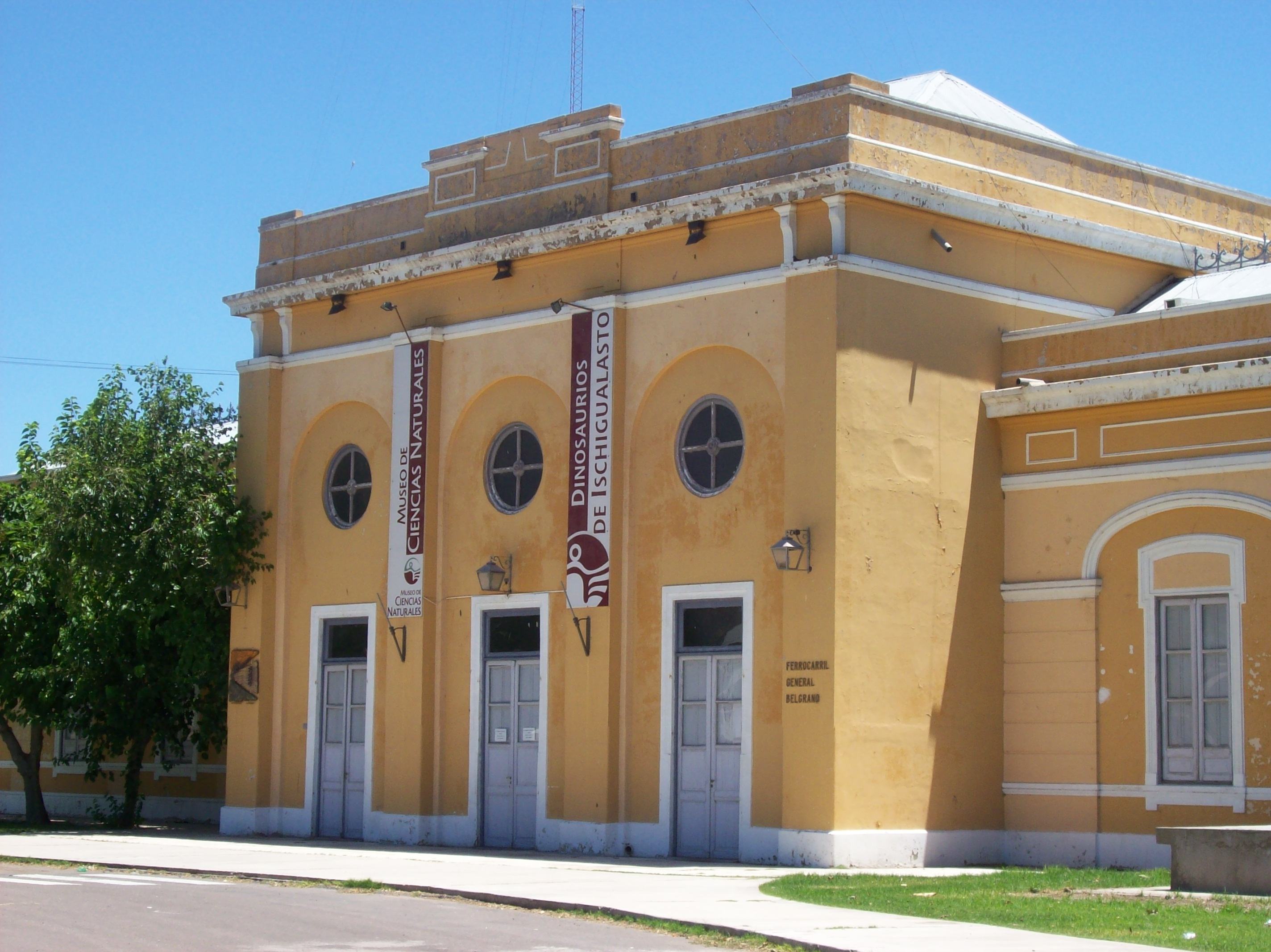 Acceso al Museo de Ciencias Naturales de San Juan, Argentina, en el edificio perteneciente a la antigua estación de trenes San Juan del Ferrocarril General Belgrano.